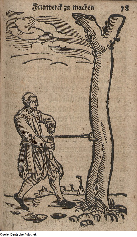 Original image description from the Deutsche Fotothek Pyrotechnik & Feuerwerk & Seil & Strick & Schraube